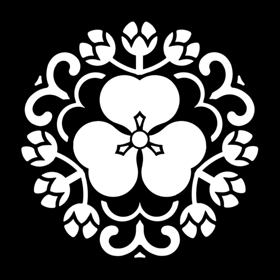 「萬屋蔓片喰」紋（染抜）